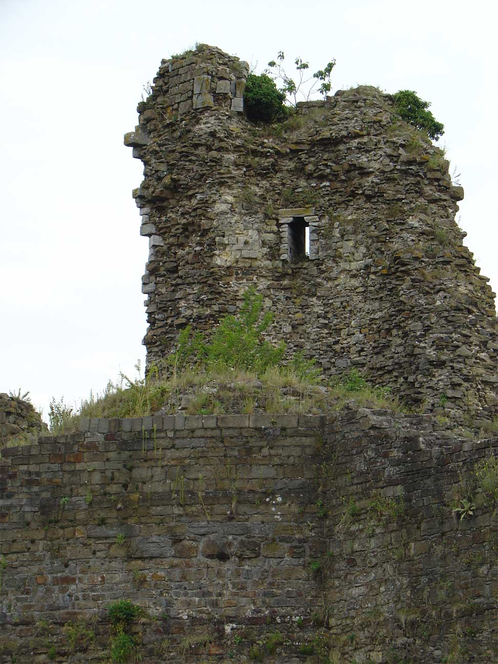 Ruïne van het kasteel van Montfort in Limburg